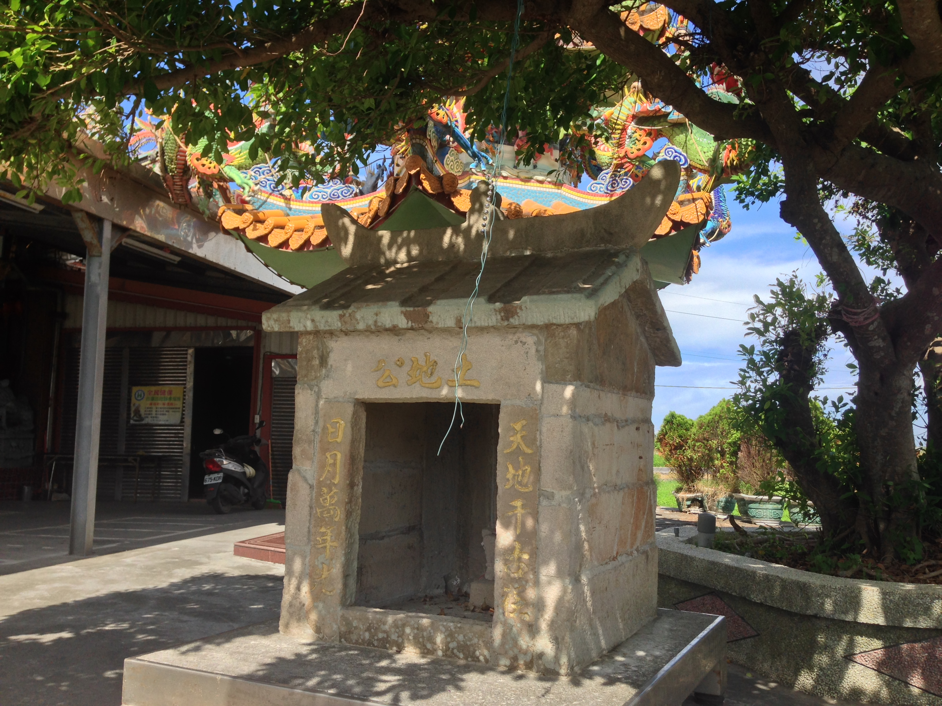 美城福德廟舊廟